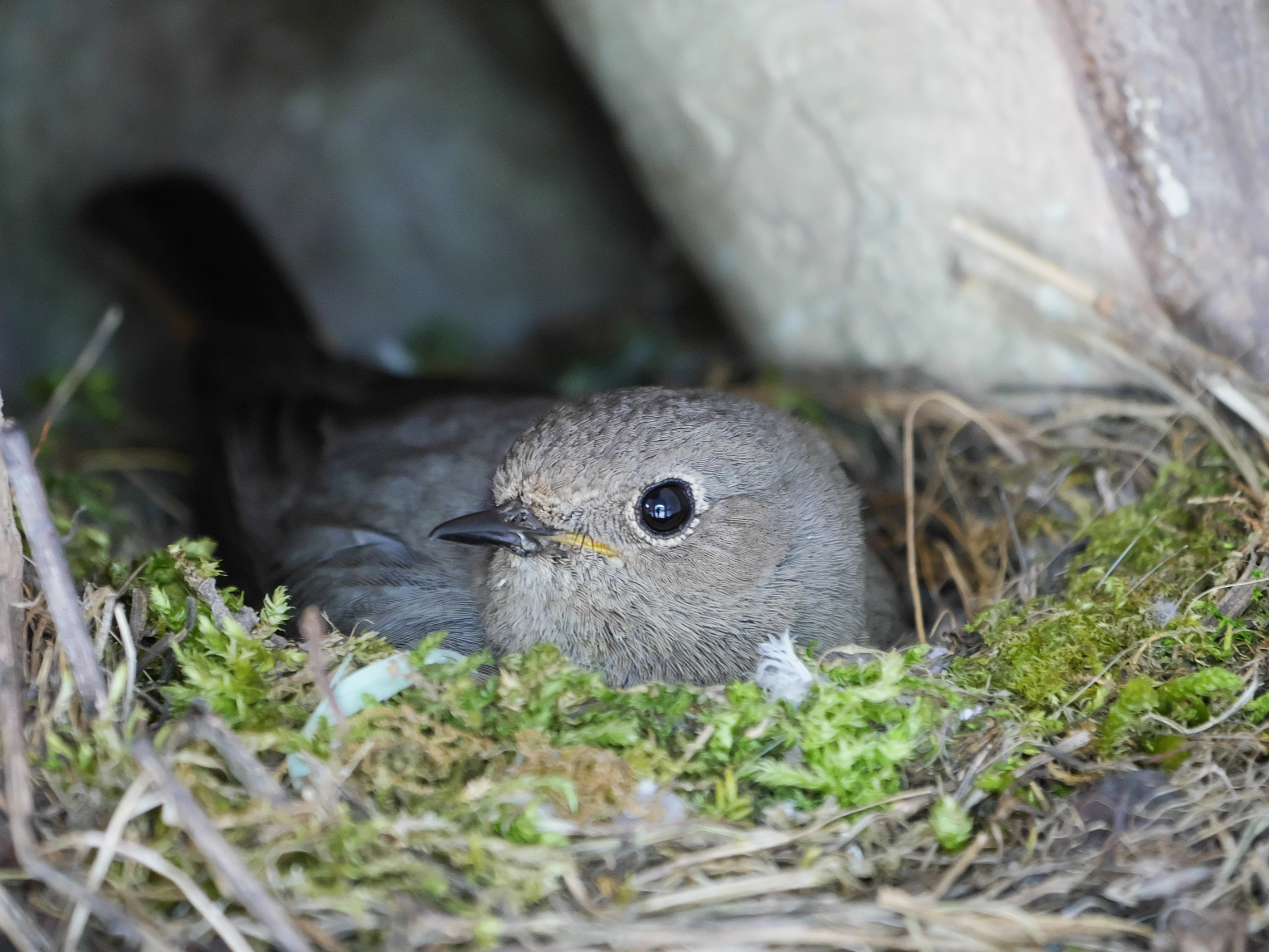 Brütendes Hautrotschwanz-Weibchen im Landschaftsschutzgebiet Moselgebiet von Schweich bis Koblenz (07-LSG-71-2) in der Sankt-Josefs-Kapelle 600 Meter nördlich von Bernkastel (Rheinland-Pfalz, Deutschland).